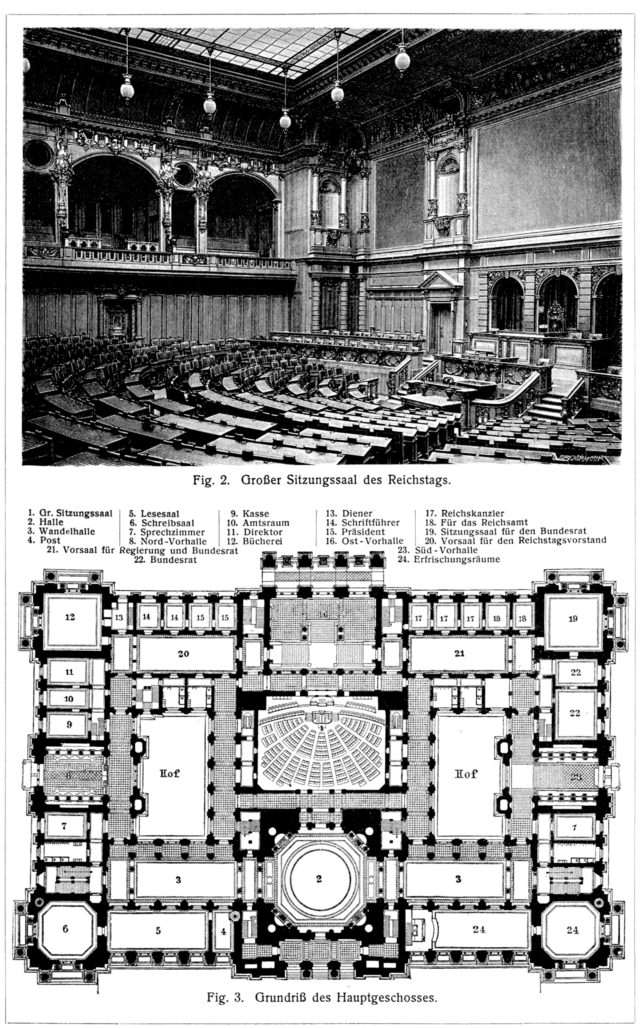 Deutscher Reichstag Innenansicht und Plan